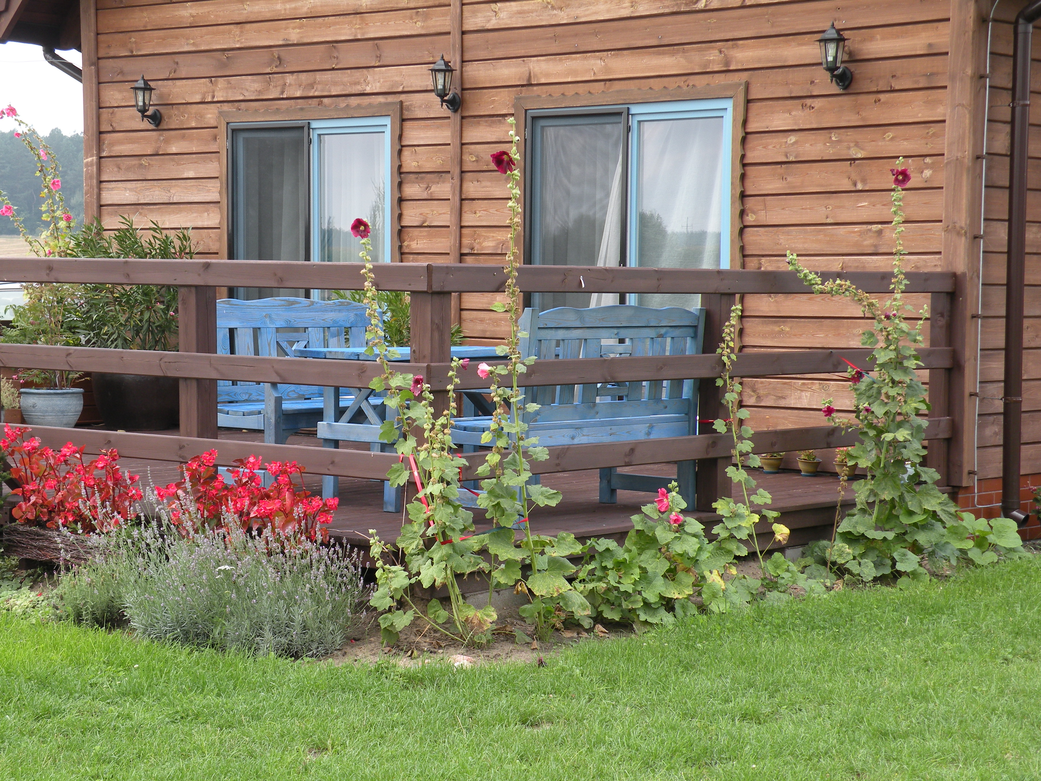 Kamio9nka koło NIdzicy, Garncarska Wioska i Rajskie Ogrody